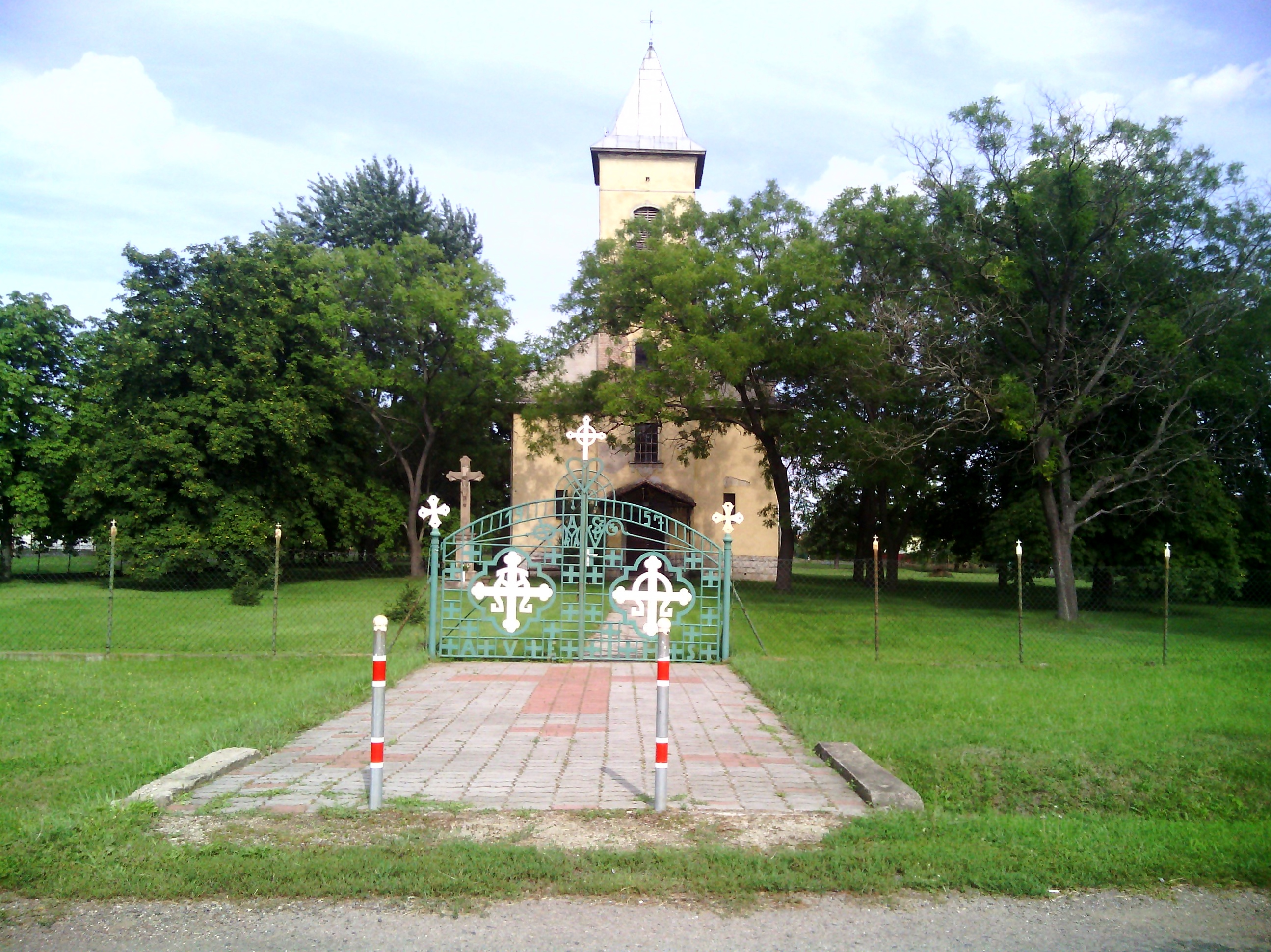 Szent Vendel-templom, Nagyút